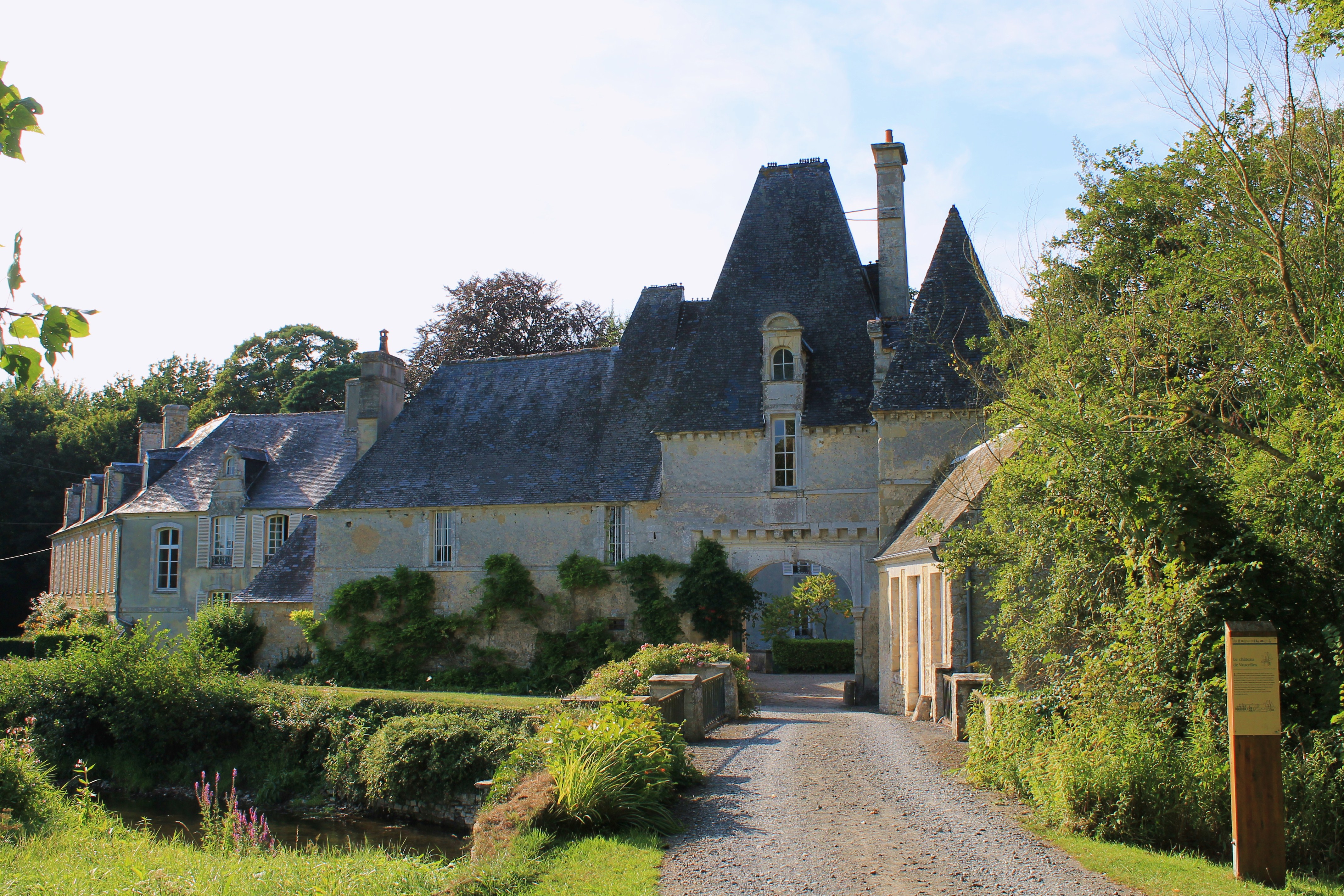 Château de la Rivière au bord la Drôme à Vaucelles (Calvados)